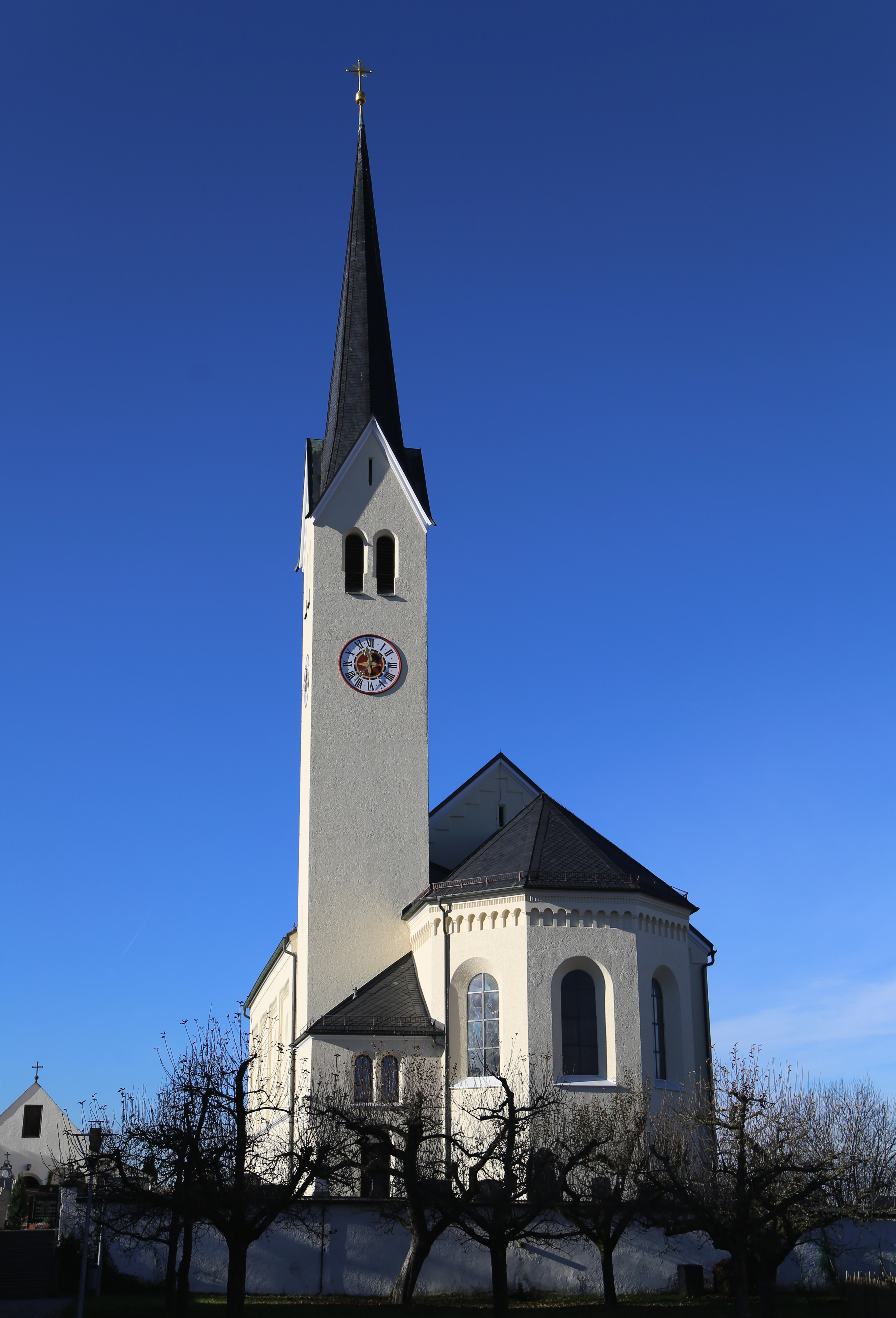 Am Kirchberg 8; Am Kirchberg 10; Kath. Pfarrkirche Mariae Himmelfahrt, Hallenbau mit Satteldach, Südturm mit Spitzhelm und Putzgliederungen, neuromanisch, Chormauern und Turmunterbau wohl 2. Hälfte 15. Jh., 1858 Neubau durch Michael Gaisberger; mit Ausstattung; Friedhofskapelle, Satteldachbau mit Rundbogentür, neuromanisch, 1860.